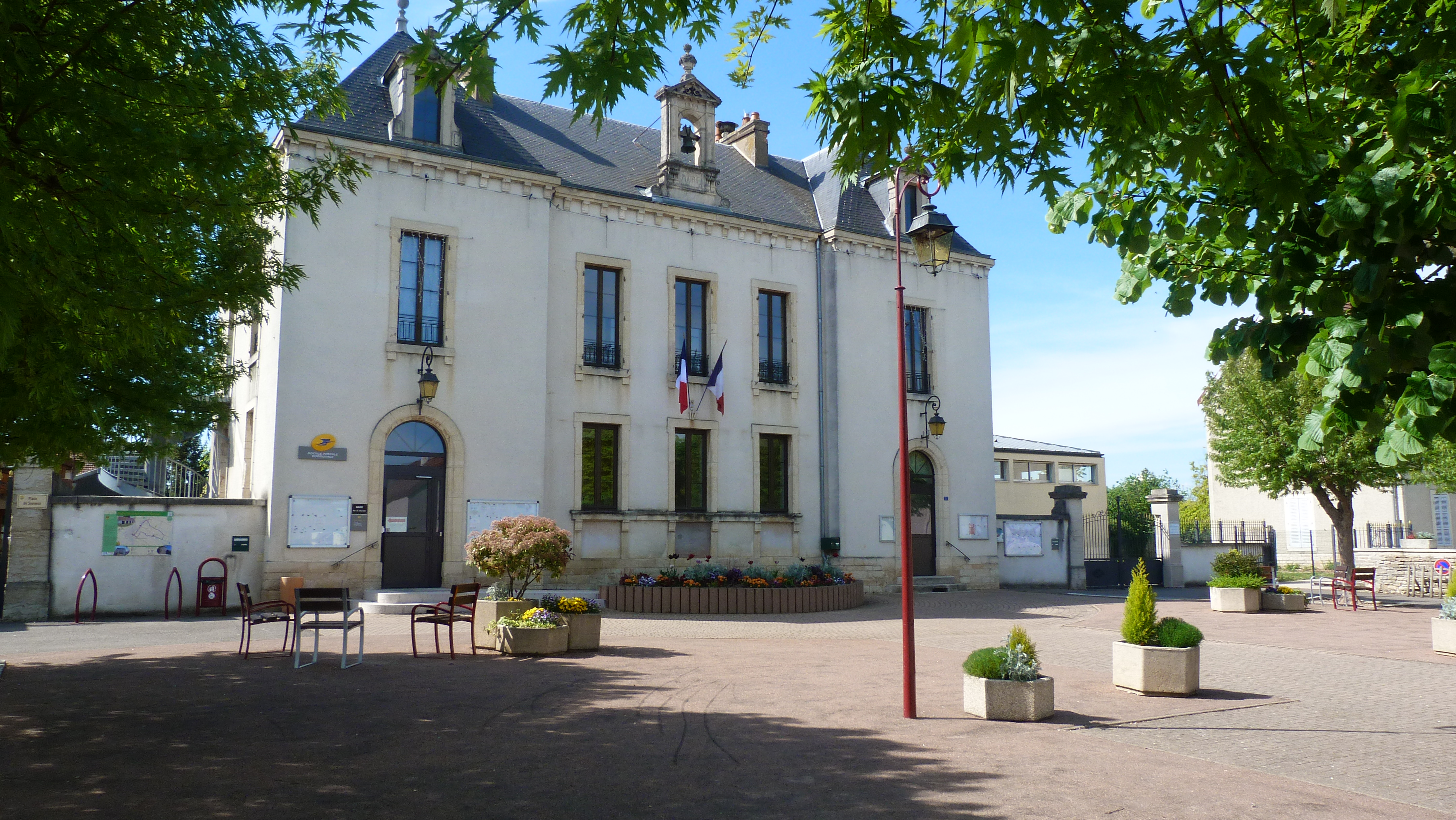 La urbodomo de Ruffey-lès-Echirey